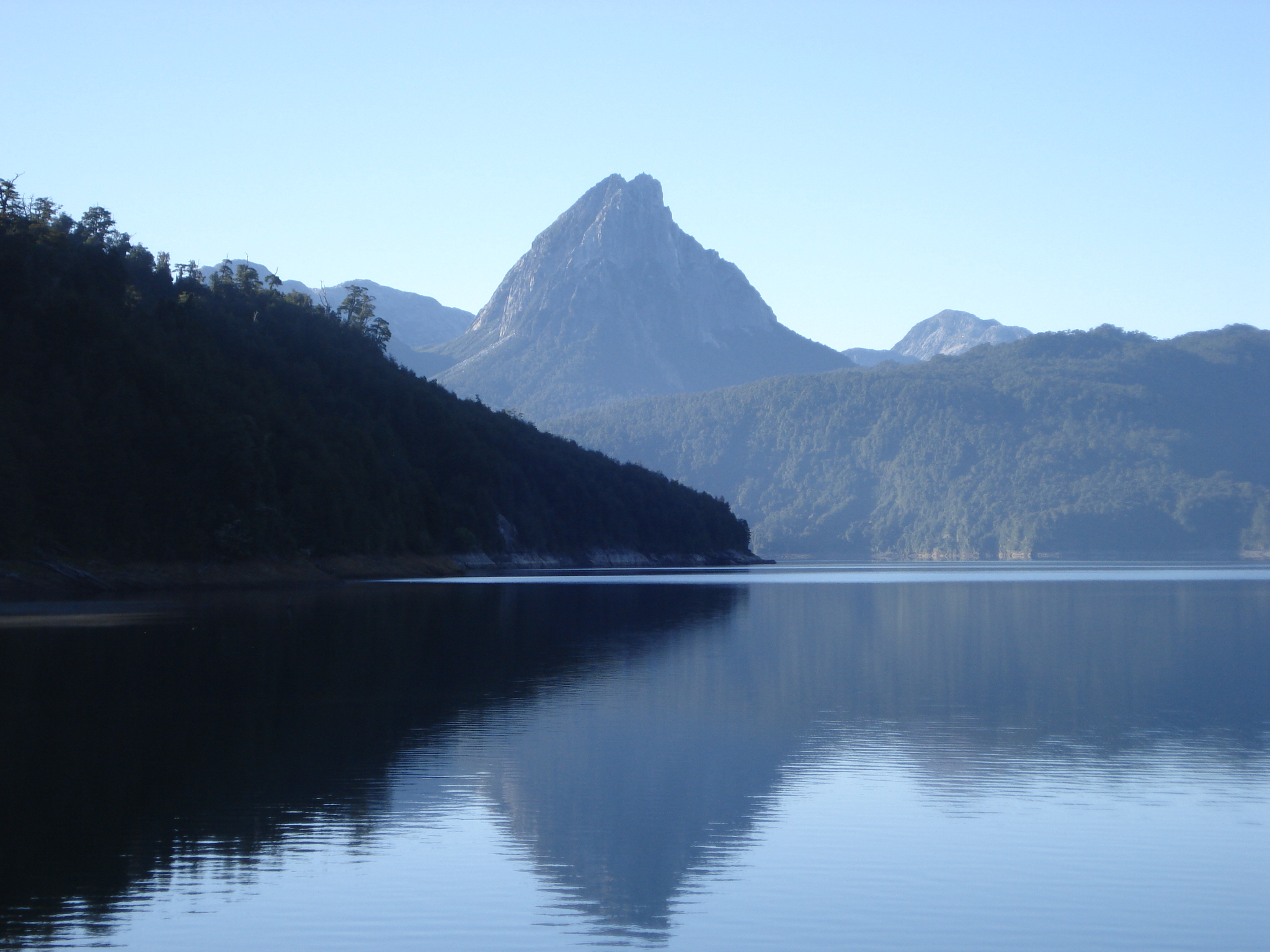 Lago Huishue, en Chile